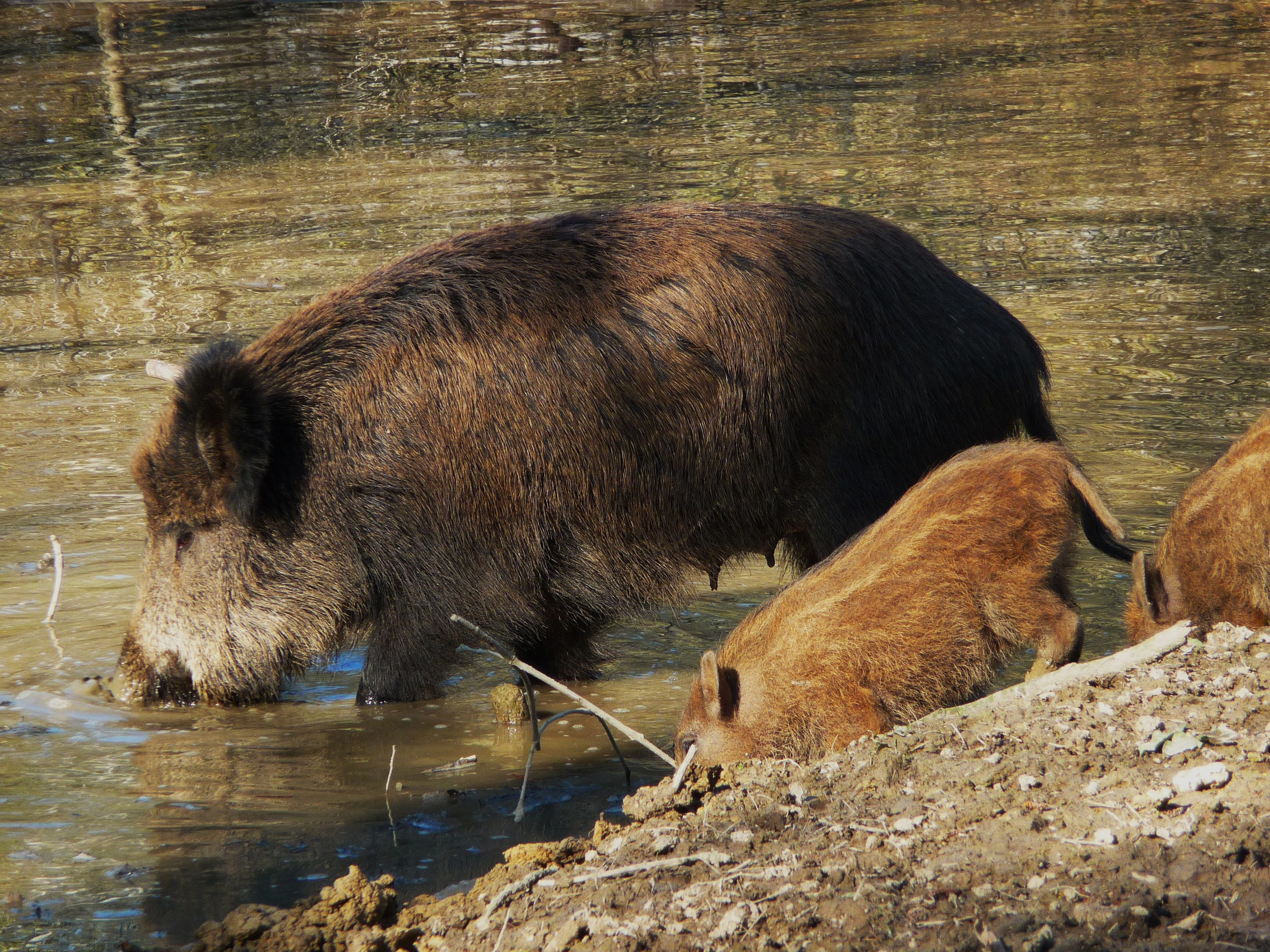 Suhlende Wildschweinbache (Sus scrofa) mit ihren Frischlingen